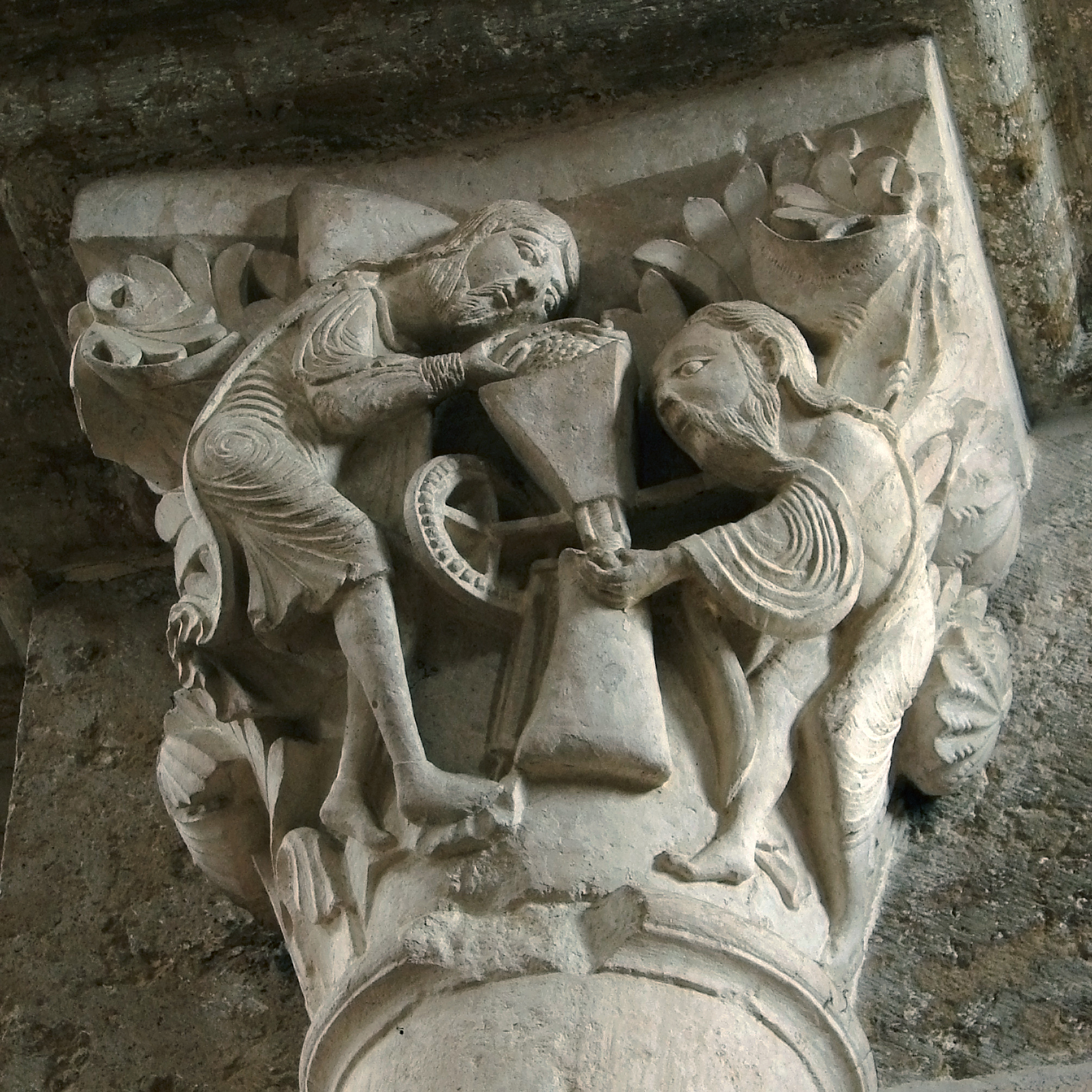 Chapiteau de la nef (2ème moitié du 12ème siècle), 4ème pile côté Sud: le Moulin Mystique. Basilique Sainte-Marie-Madeleine de Vézelay.